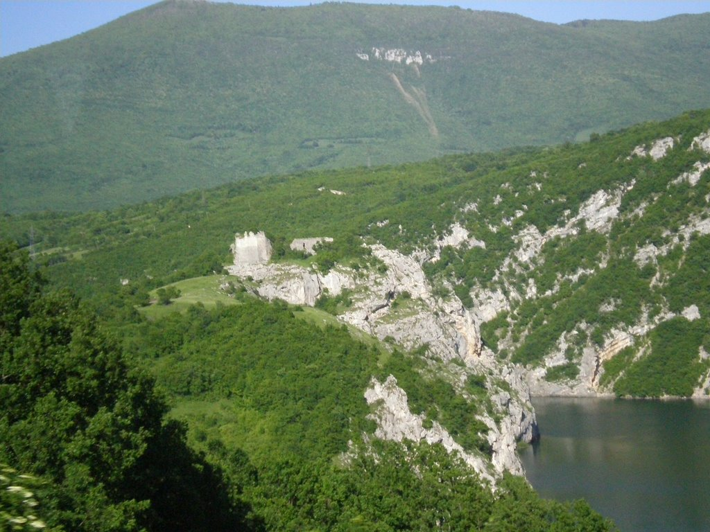 Ostaci starog grada. Bočac na rijeci Vrbas.